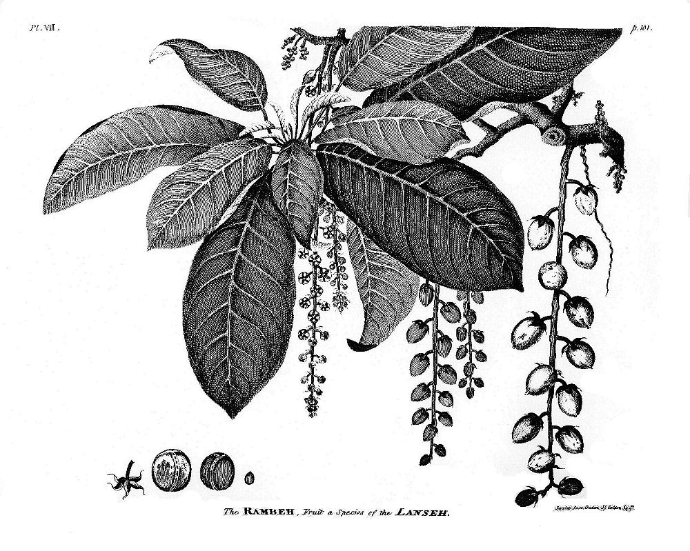 Rambeh